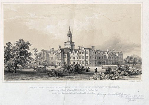 Groundsmen working on lawns.